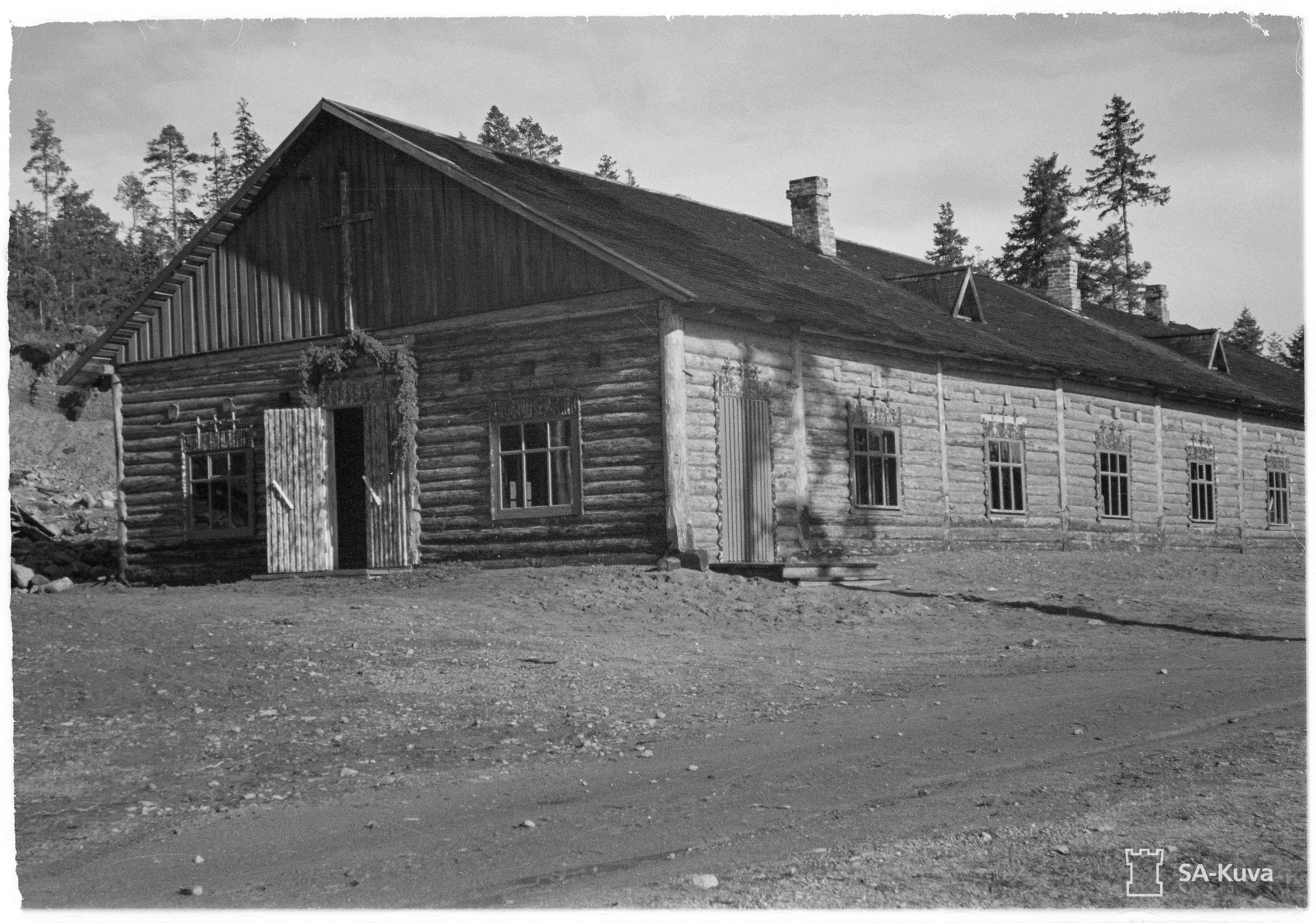 Suursaaren korsukirkko, Suursaari 1943.09.27 SA-kuva. Kuvan numero 138465.